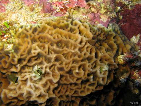 Leptoseris mycetoseroides, colonia in situ, Pacífico sudoeste.